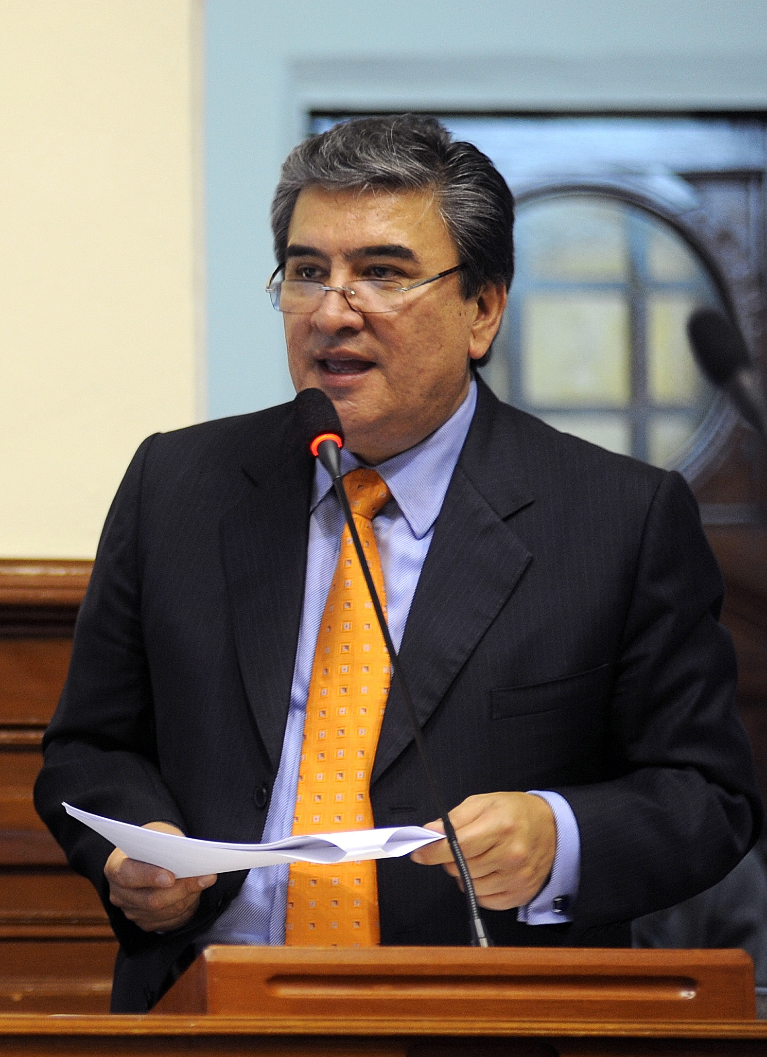 El congresista Víctor Rolando Sousa Huanambal fija su posición en el debate parlamentario realizado esta tarde por el Pleno.